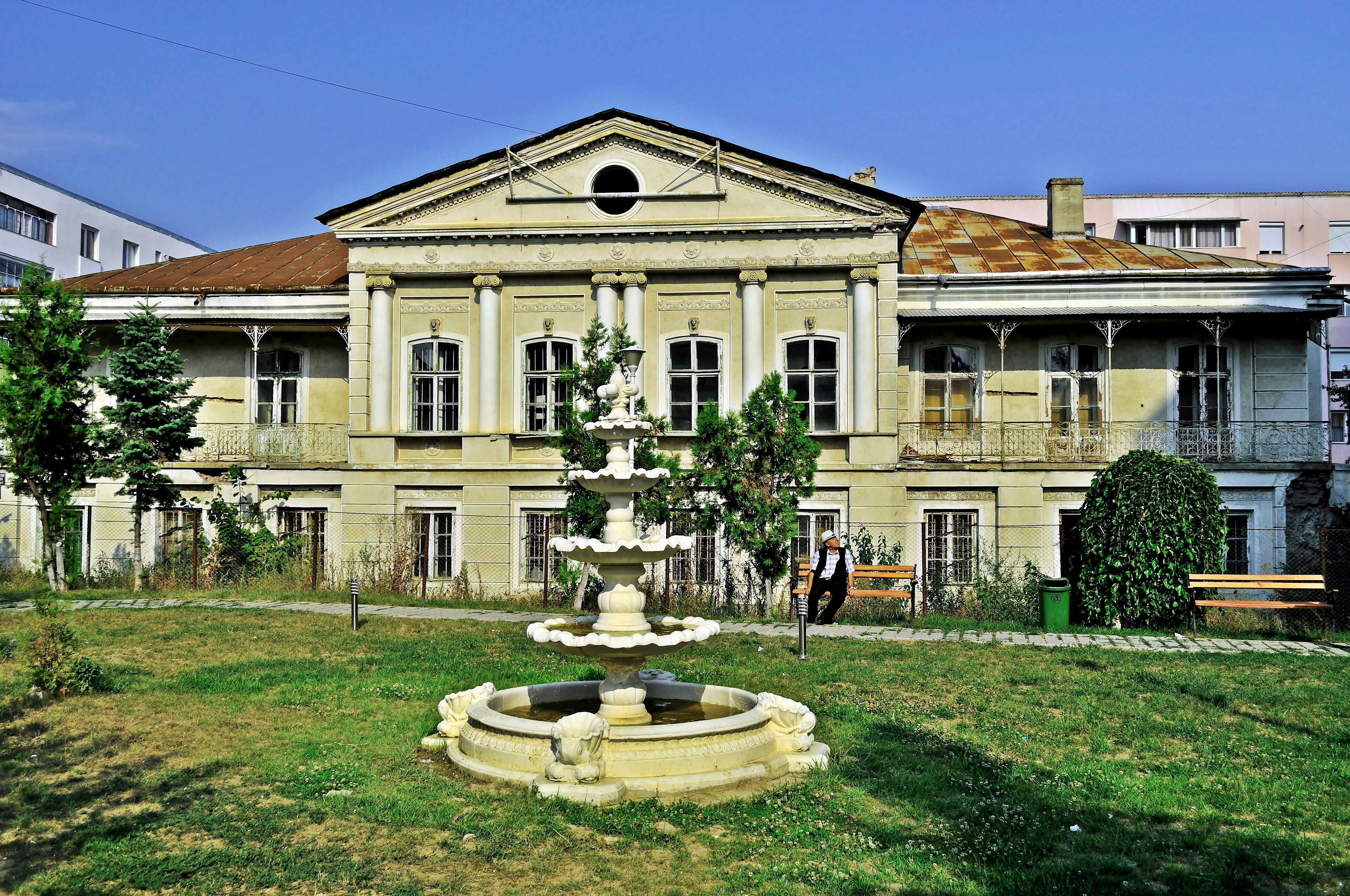 Casa vornicului Done (Casa Celibidache) din Roman,Neamt,Romania . situata in centrul municipiului Roman; dateaza de la sfarsitul secolului al XVIII-lea, fiind cumparata in 1825 de vornicul Grigore Done; este o constructie cu o arhitectura oarecum inedita, ce diferentiaza subsolul cu doua beciuri etajate si parterul cu bolti semicilindrice, de nivelul superior, conceput si realizat in stil clasic, cu fronton si coloane angajate la exterior si bogate decoratiuni de factura baroca in interior; cunoscuta si sub numele de Casa Celibidache, deoarece aici s-a nascut, in 1912, Sergiu Celibidache, considerat ca fiind unul din cei mai valorosi dirijori ai tuturor timpurilor, care a dirijat Orchestra Filarmonicii din Munchen intre 1979 si 1996; monument istoric.